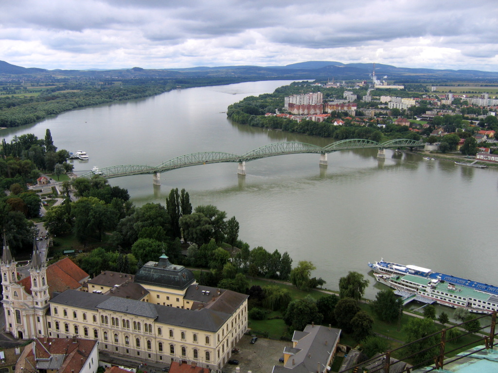 Autor Ervín Pospíšil